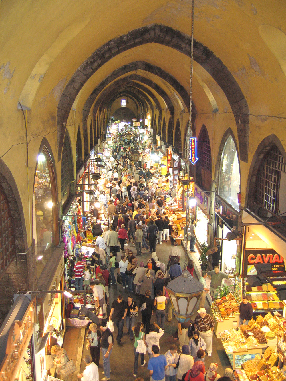 Ägyptischer Bazar in Istanbul